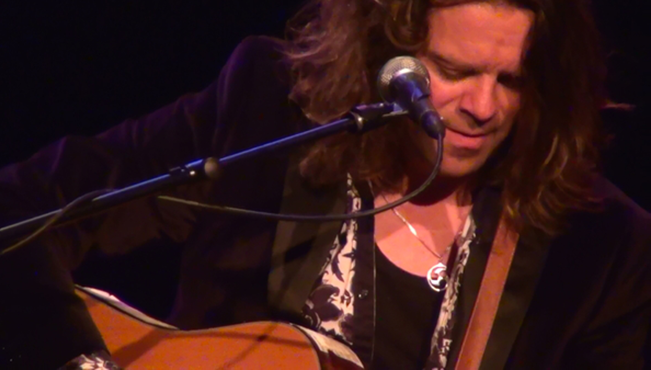 Frank Blueka